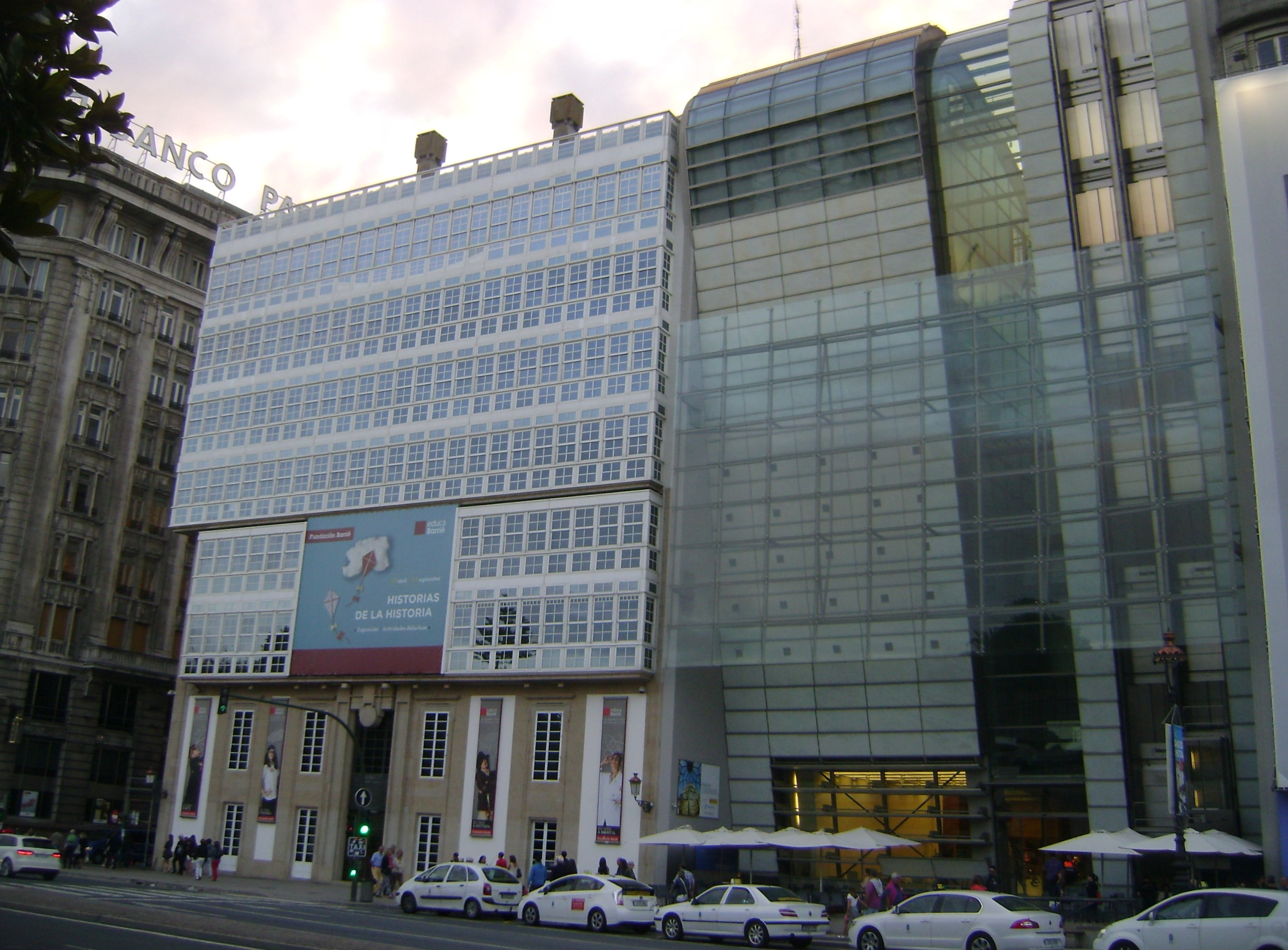 La Coruña (España). Edificios de la Fundación Pedro Barrié de la Maza y de la Funcación Abanca.